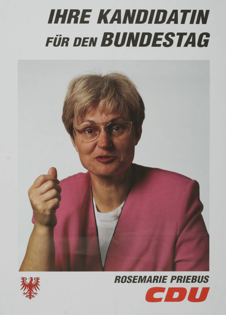 Ihre Kandidatin für den Bundestag Rosemarie Priebus CDUAbbildung:Porträtfoto - Brandenburgischer AdlerPlakatart:Kandidaten-/Personenplakat mit PorträtObjekt-Signatur:10-001: 4035Bestand:Plakate zu Bundestagswahlen (10-001)GliederungBestand10-18:Plakate zu Bundestagswahlen (10-001) » Die 13. Bundestagswahl am 16. Oktober 1994 » CDU » Mit PorträtfotoLizenz:KAS/ACDP 10-001: 4035 CC-BY-SA 3.0 DE